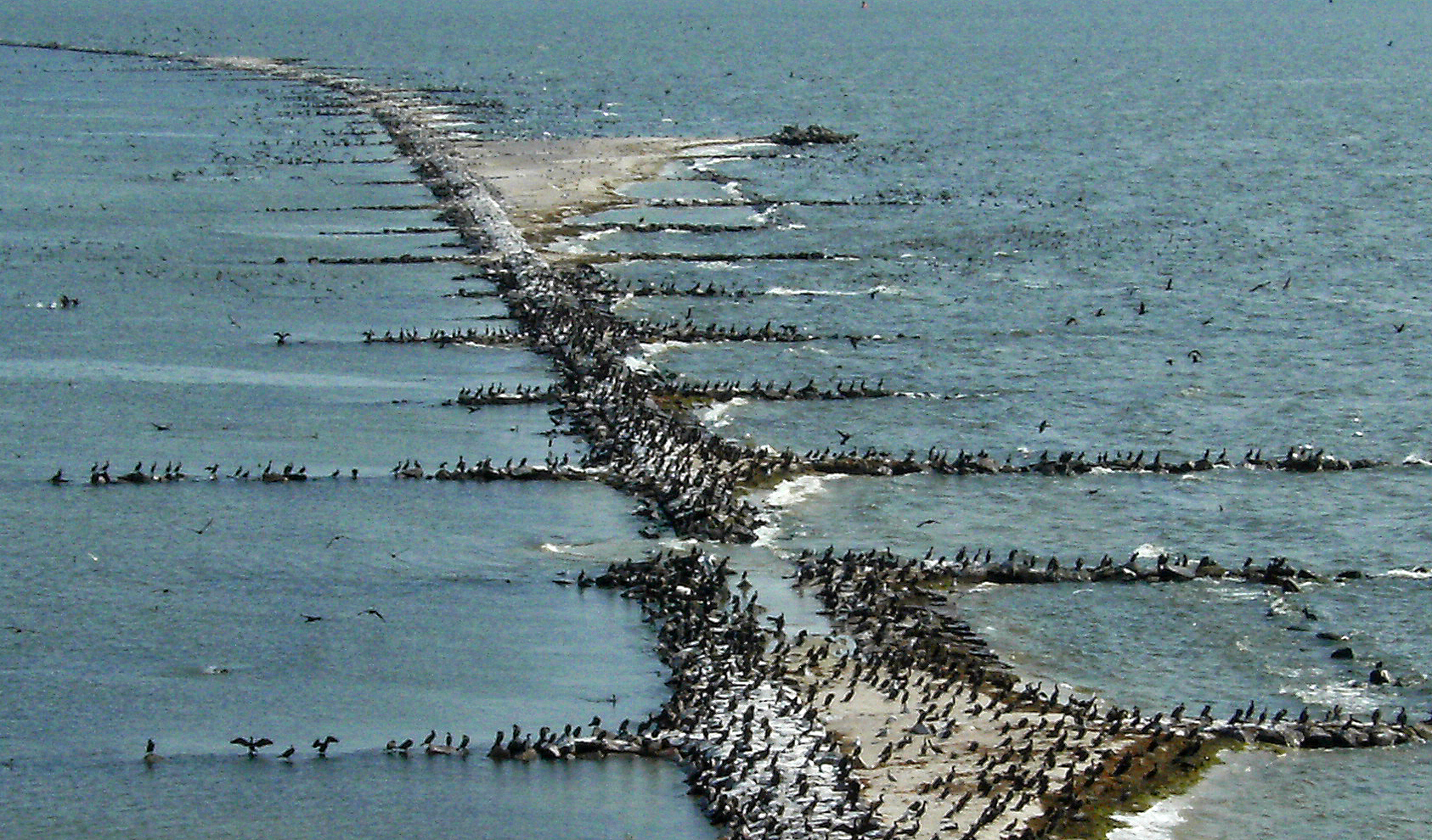 Ruden - Flakstellung (vorne), Mole mit Kormoranen